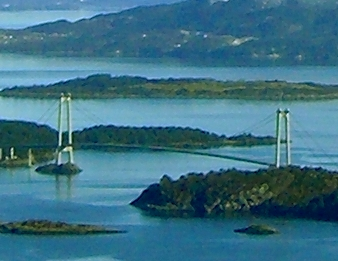 no: Utsikt frå Siggjo. Landet nedst i bilete er øya Bømlo. Vegen ein ser på Bømlo er Riksveg 542. Vegen fortset ut på Spyssøy over lågbrua Spyssøybrua over Gassasundet. Frå Spyssøy går vegen over hengebrua Bømlabrua til Nautøy. Bak Nautøy ligg Føyno. Frå Føyno fortset vegen som Europaveg 39 over Stordabrua til sørspissen av øya Stord. Ei anna grein av vegen fortset frå Føyno i undervasstunnelen Bømlafjordtunnelen til Sveio. Bruene og tunnelen utgjer Trekantsambanet. Fjorden heiter Sagvågfjorden til venstre for Gassasundet, og Bømlafjorden til høgre for Gassasundet og austom og sørom øyene.